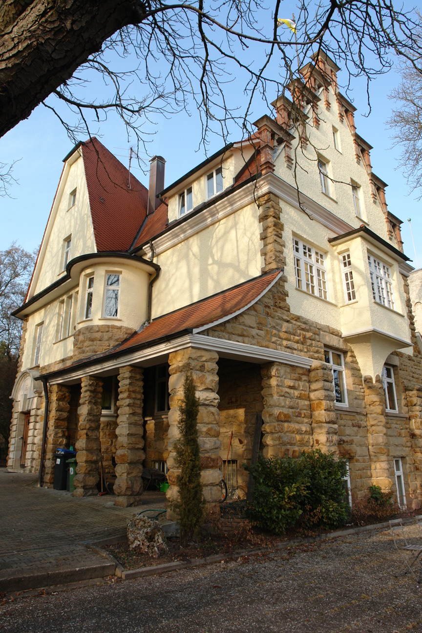 Verbindungshaus der Landsmannschaft Ulmia in Tübingen in der Stauffenbergstraße 10.